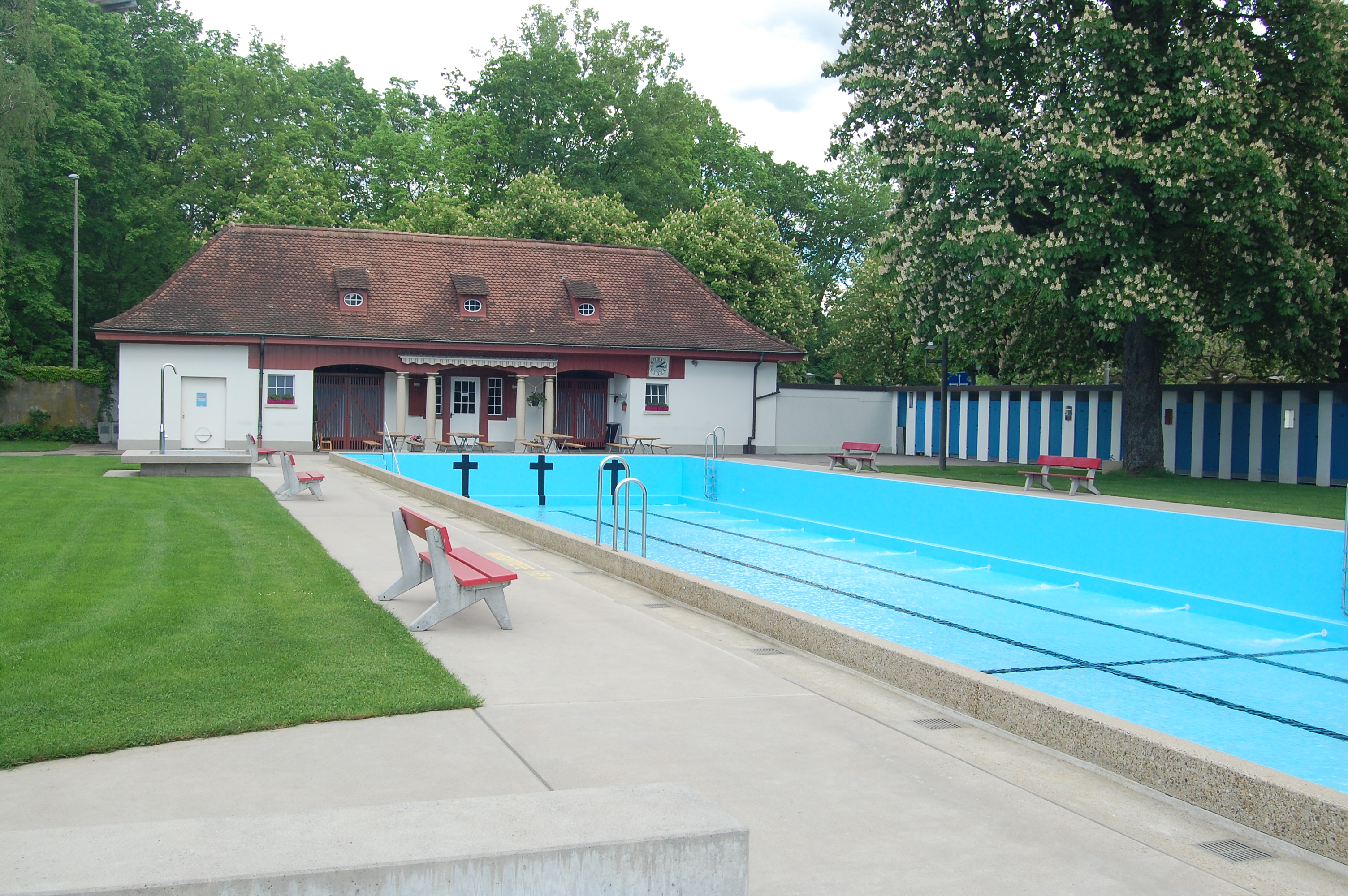 Eglisee Basel, Schwimmbecken im Frauenbad mit Liegewiese